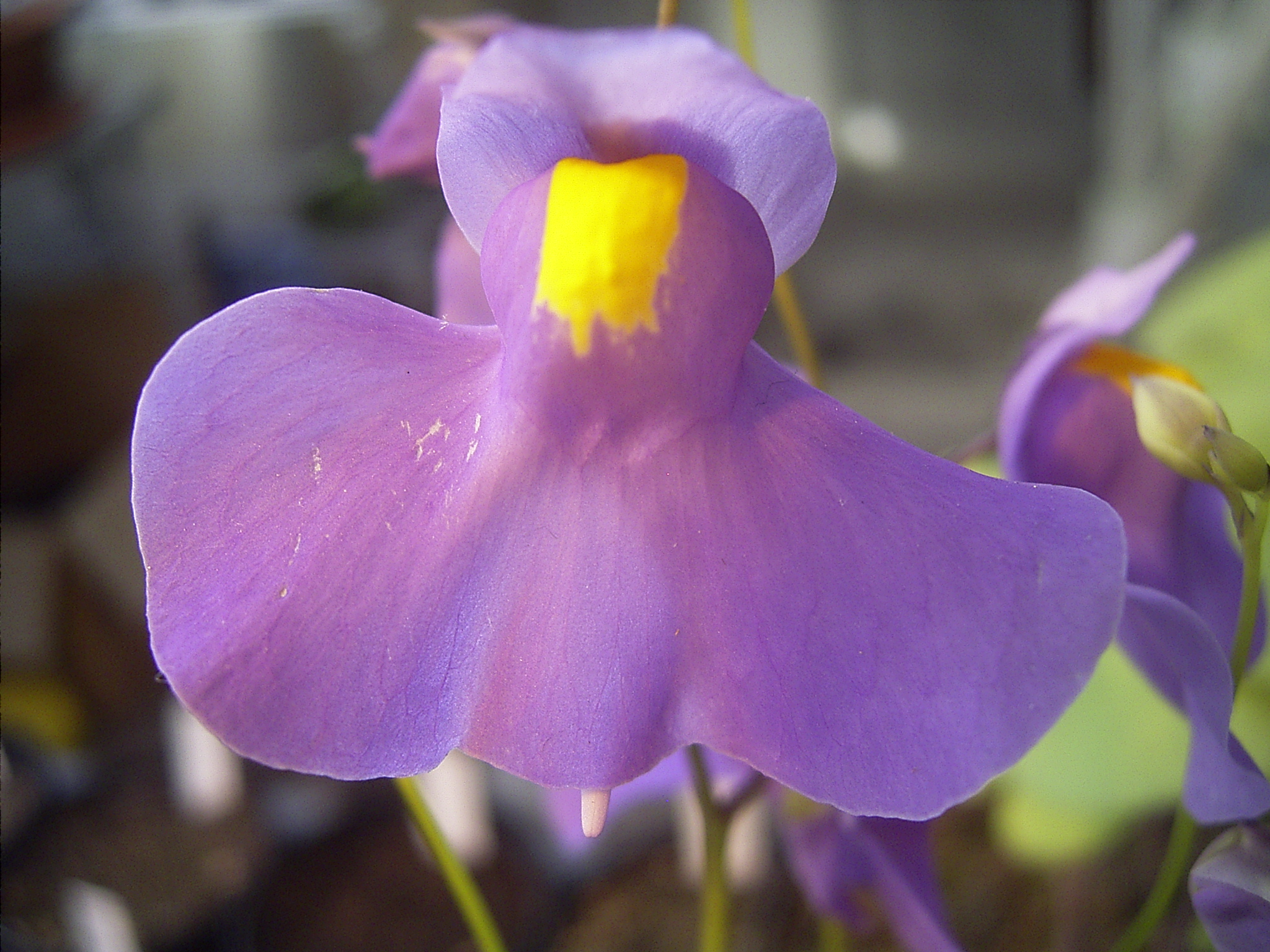 Utricularia longifolia flora